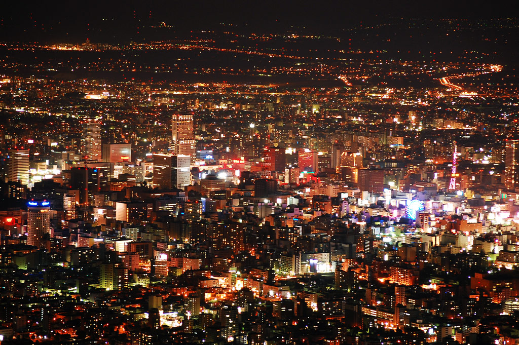 藻岩山からの夜景２